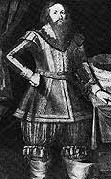 Landshövding Peter Kruse